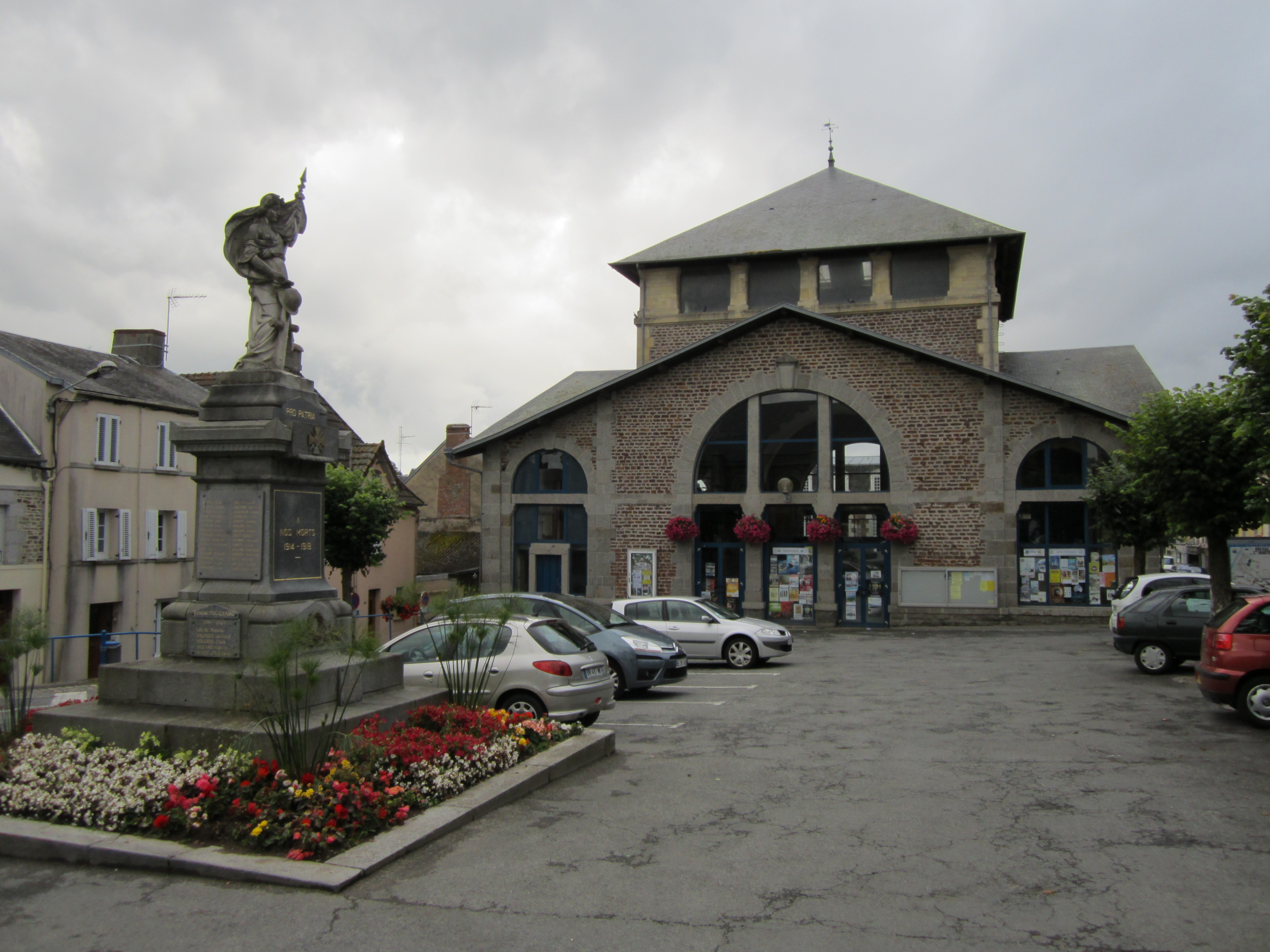 ancienne halle de Bréhal